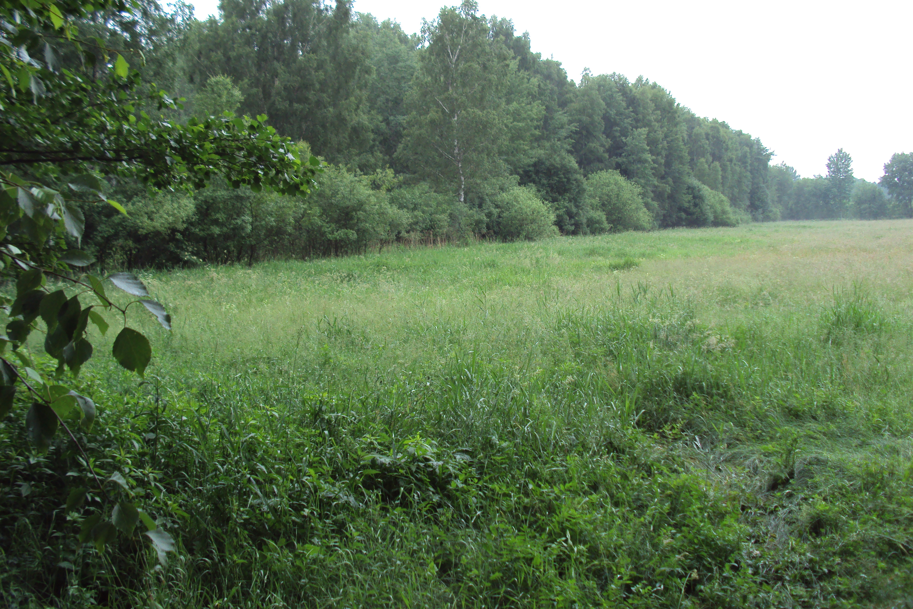 Chráněné louky PR Slunečný dvůr na Českolipsku